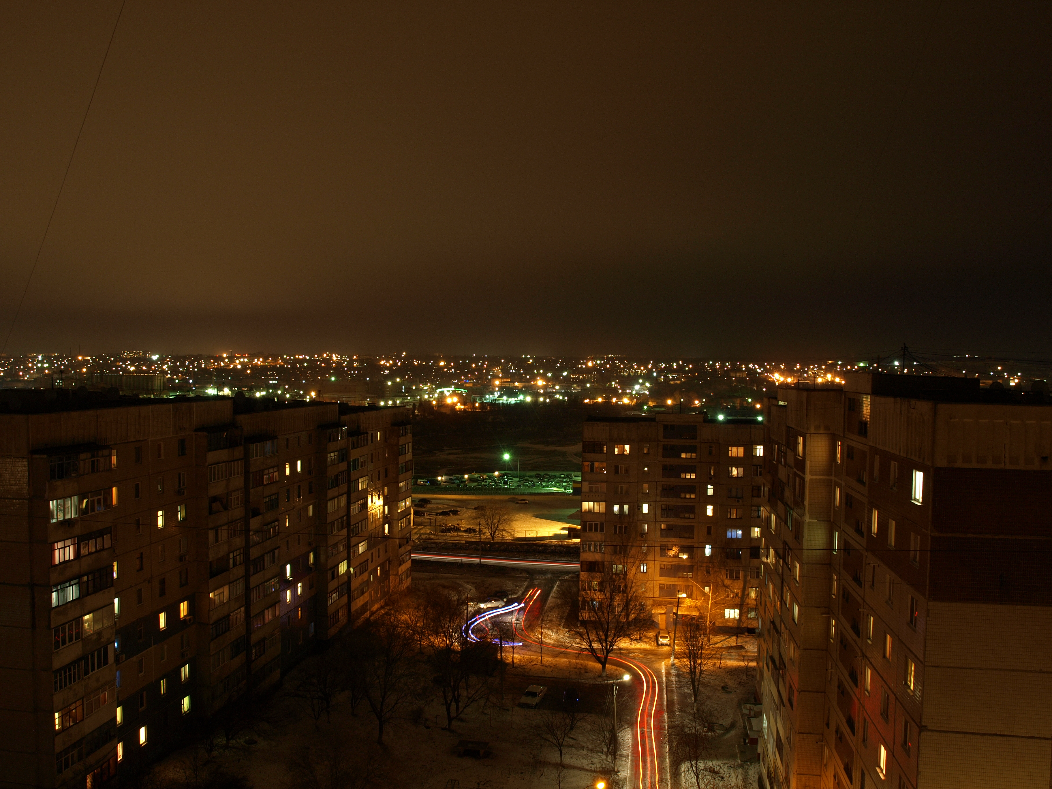 11 этаж